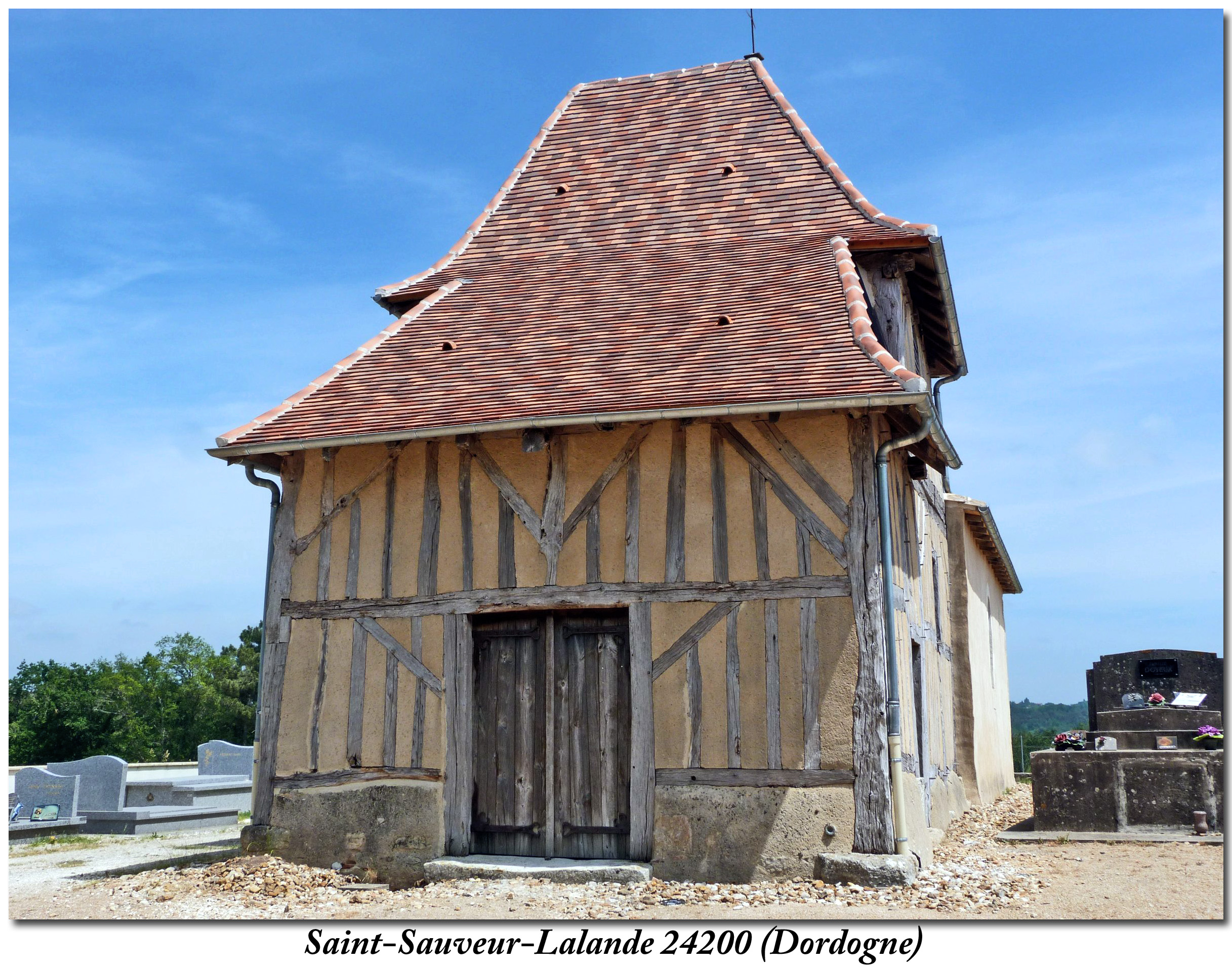 vue du parvis